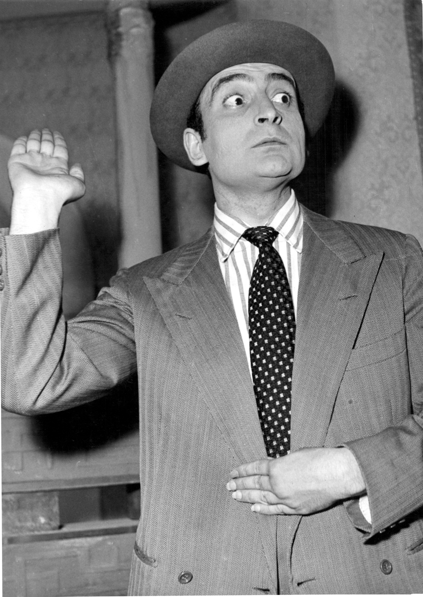 Nino Milano